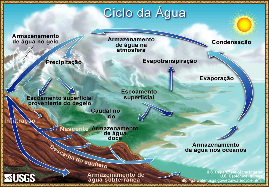 Ciclo hidrológico em Português, traduzido por Maria Helena Alves.